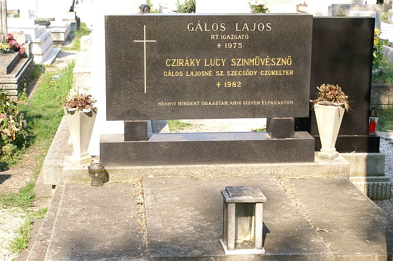 Cziráky Lucy (Cziráki Luci, Gálos Lajosné) (? - 1982) színésznő sírja Budapesten. Megyeri temető: 14/I/0/31-32